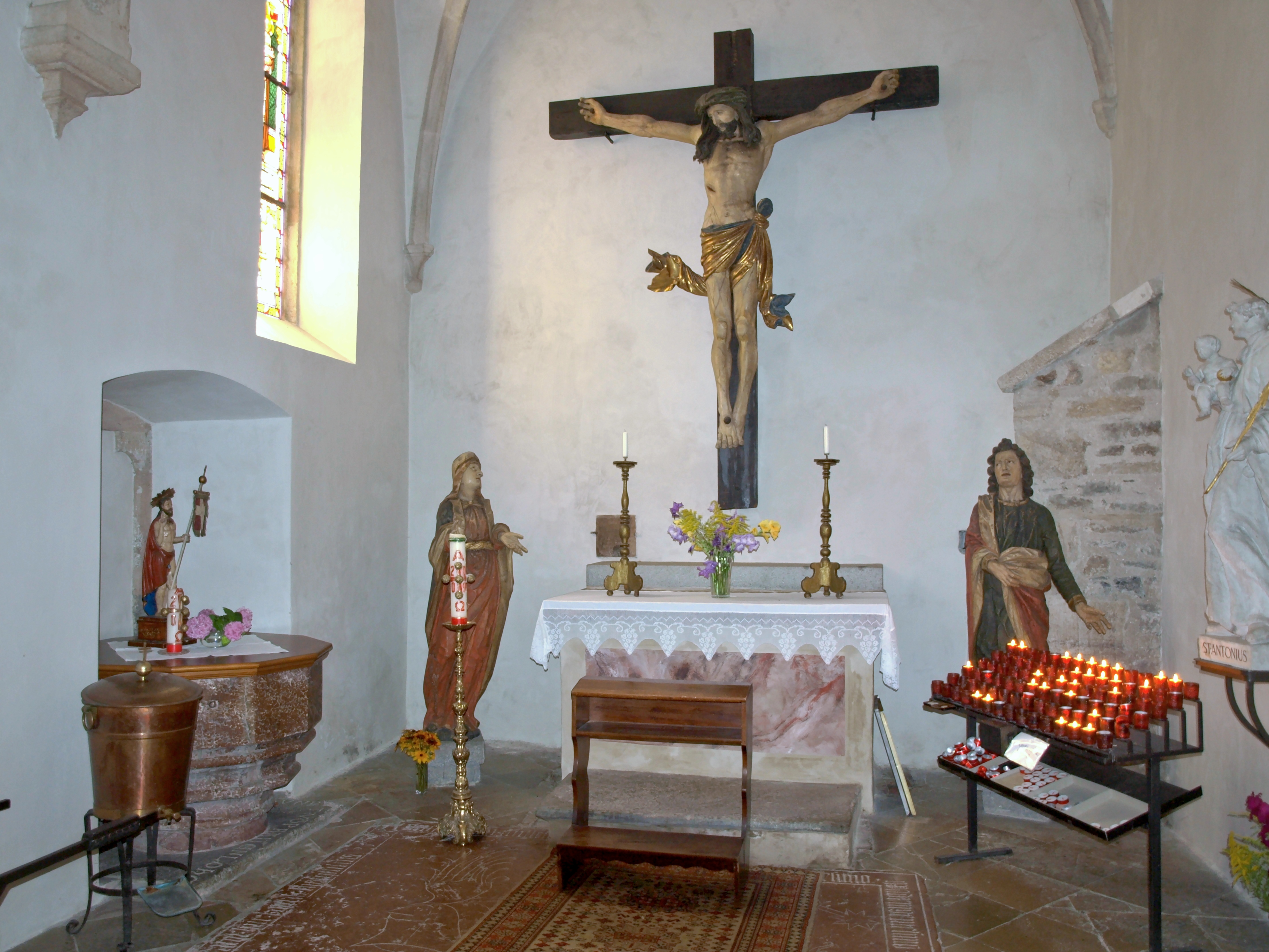 Kath. Pfarrkirche hl. Mauritius